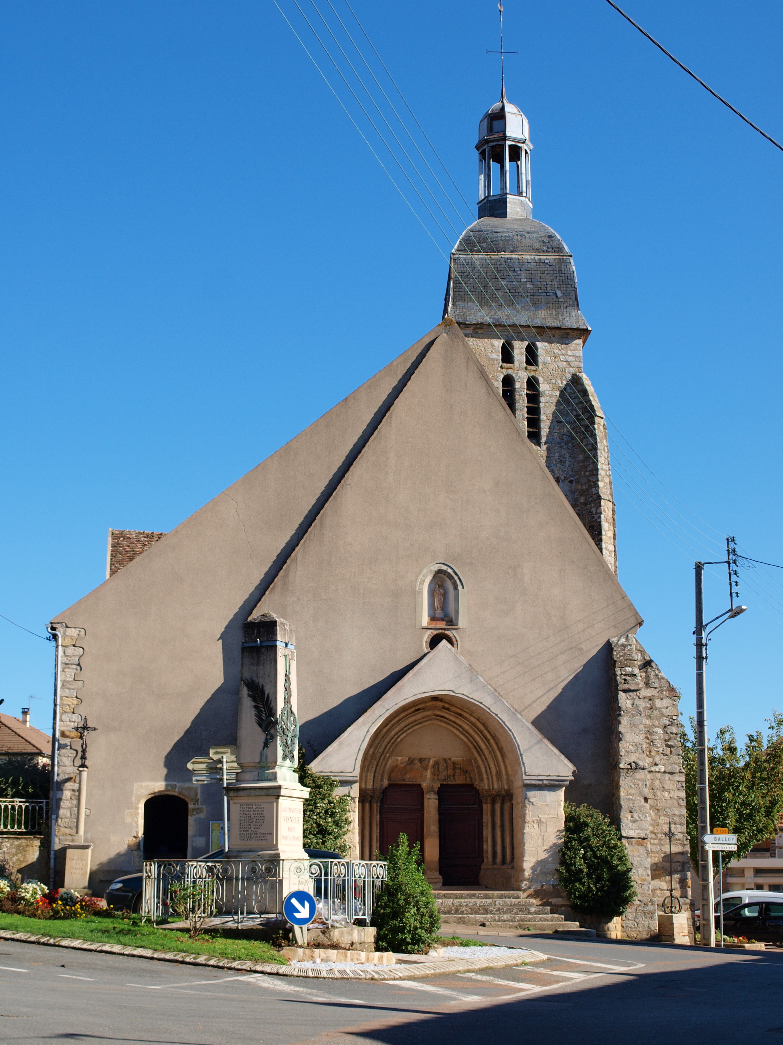 Église Saint-Georges de Vinneuf (Yonne, France)